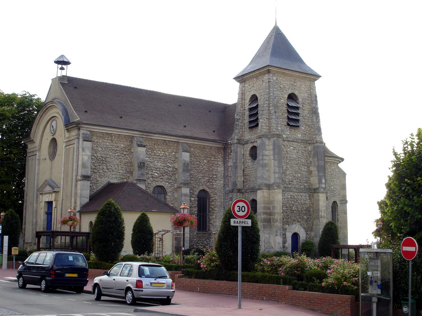 L'église Saint-Martin à Bonneuil-en-France (Val-d'Oise), France